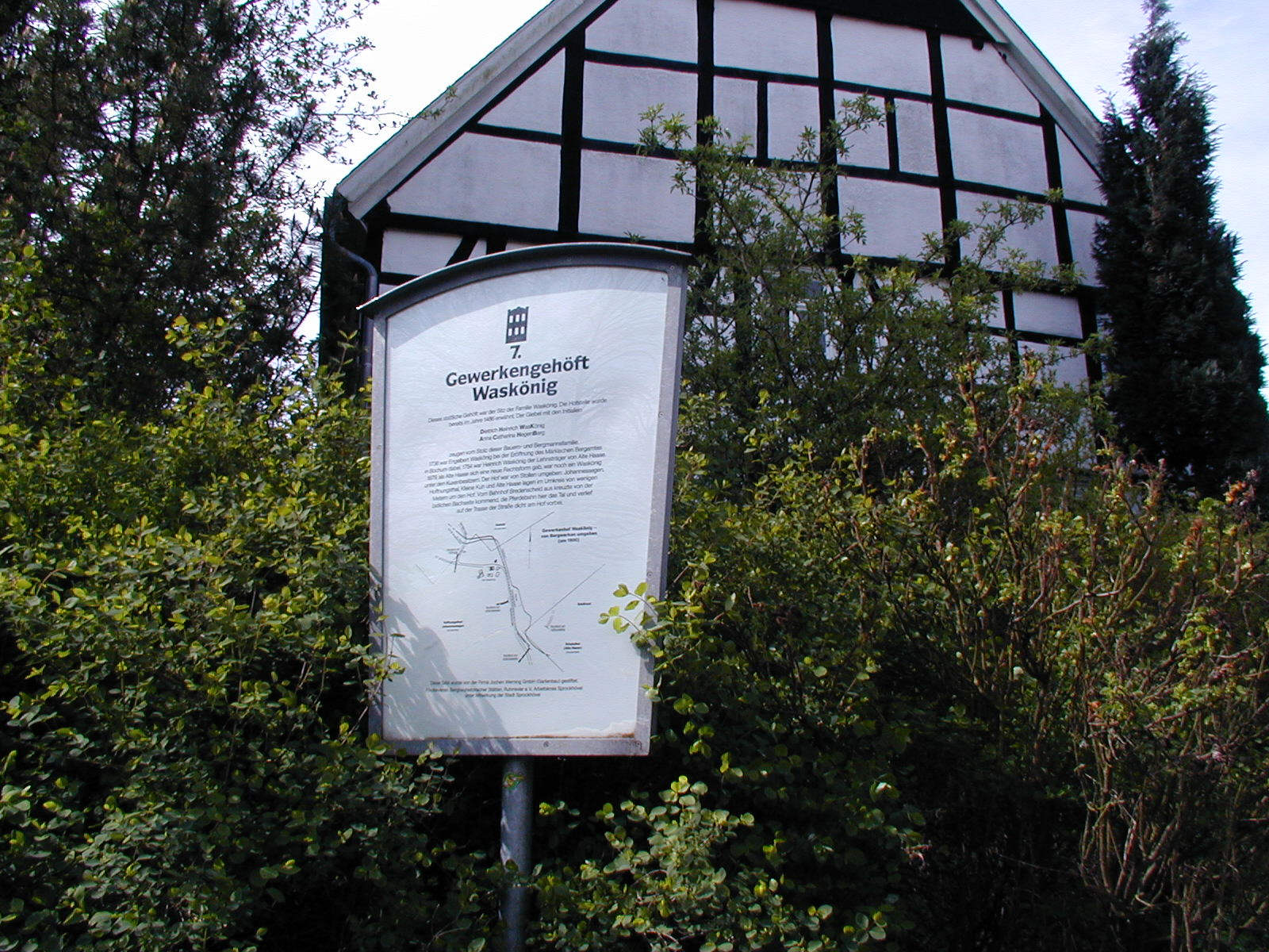 Historische Stätte am Bergbauwanderweg Alte Haase Nord in und um Niedersprockhövel, Standort-Infotafel zum Gewerkengehöft Waskönig in Hattingen-Niederstüter